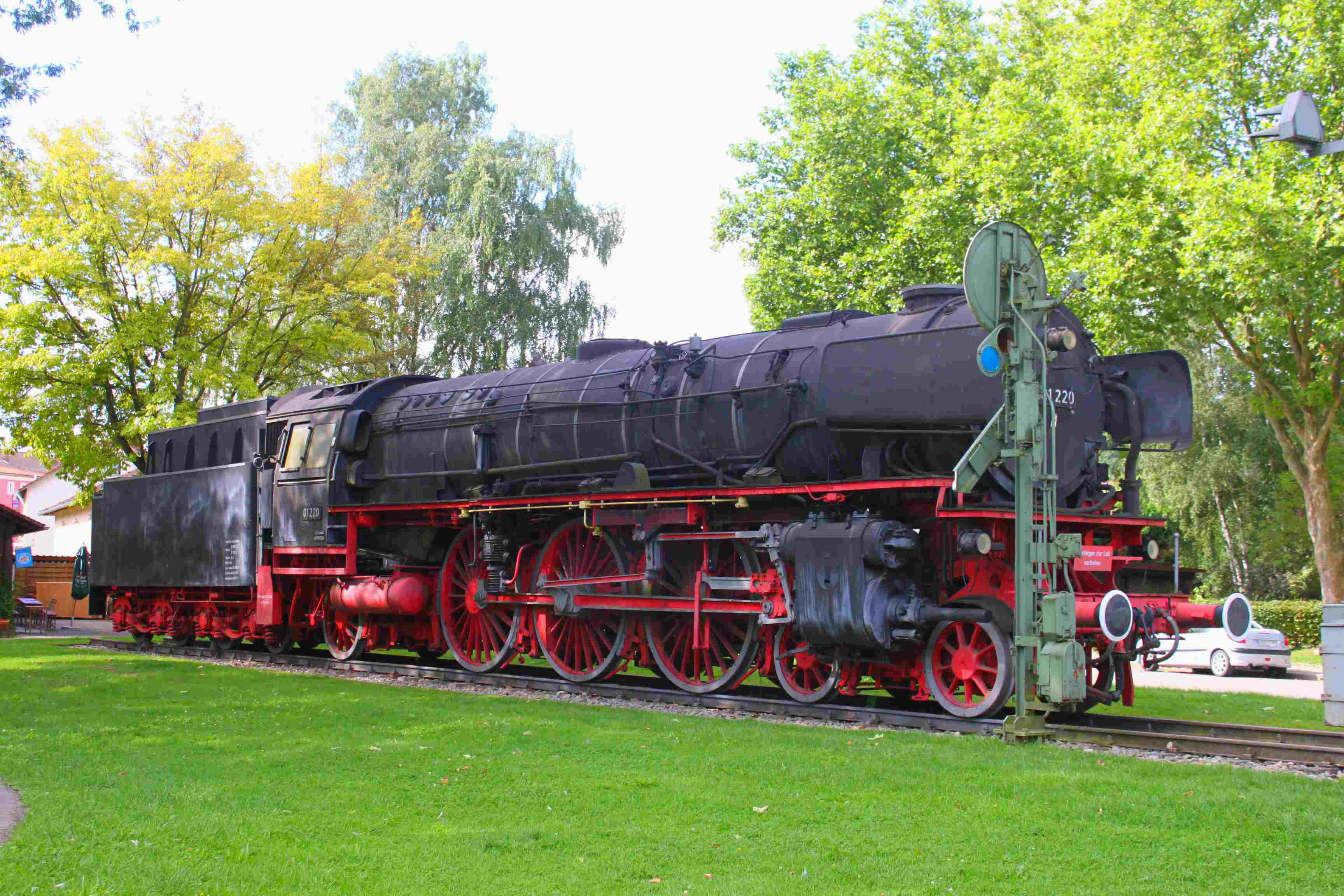 Alte Dampflok der Baureihe 01 220 in einem Park in Treuchtlingen